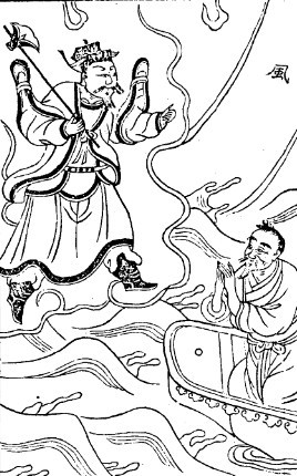 中文（香港）: 晏公是中國水神信仰的一位對象。晏公本為江西的地方性水神，明朝時開始在全國範圍內流行，在長江中下游地區信仰尤盛；清代之後逐漸衰微。